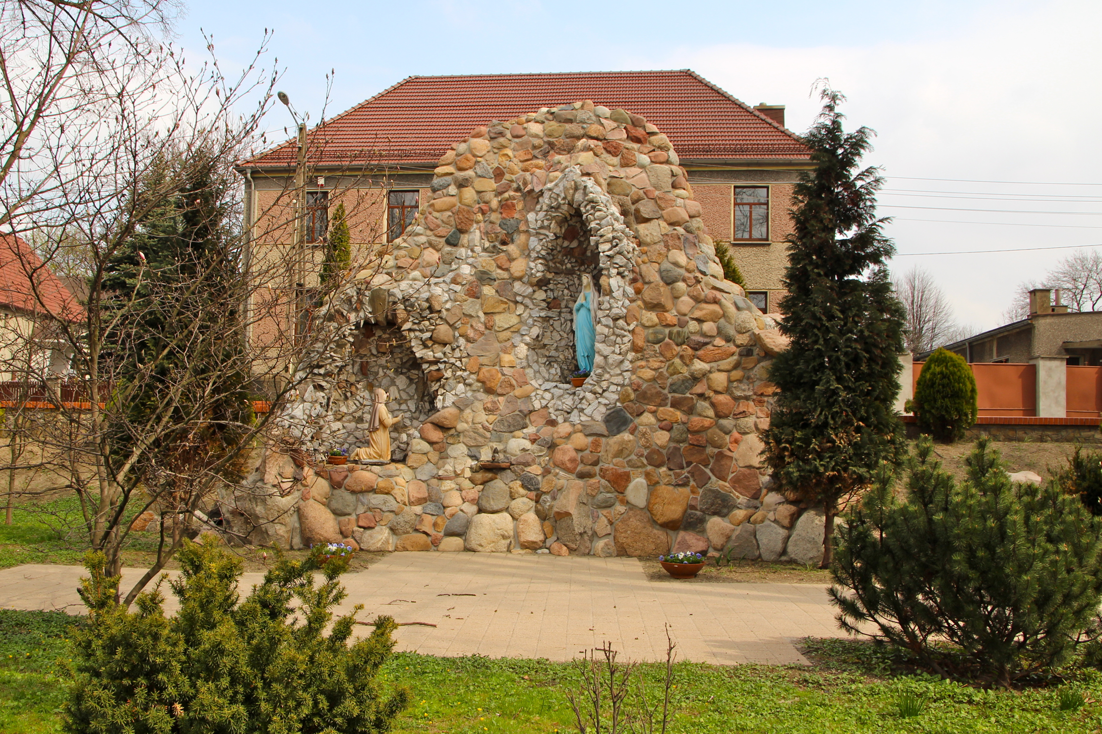 Długomiłowice (dodatkowa nazwa w j. niem. Langlieben) – wieś w Polsce położona w województwie opolskim, w powiecie kędzierzyńsko-kozielskim, w gminie Reńska Wieś.